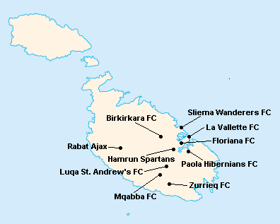 Répartition des clubs en Premier League Maltaise 1994-1995.